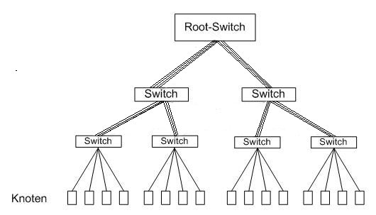 Fat Tree